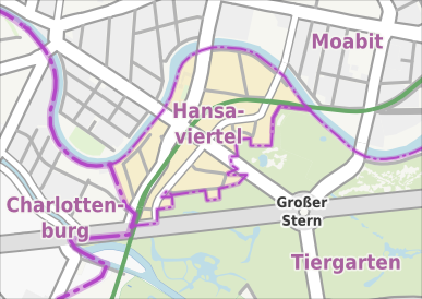 Übersichtskarte der Straßen und Ortslagen in Berlin-Hansaviertel